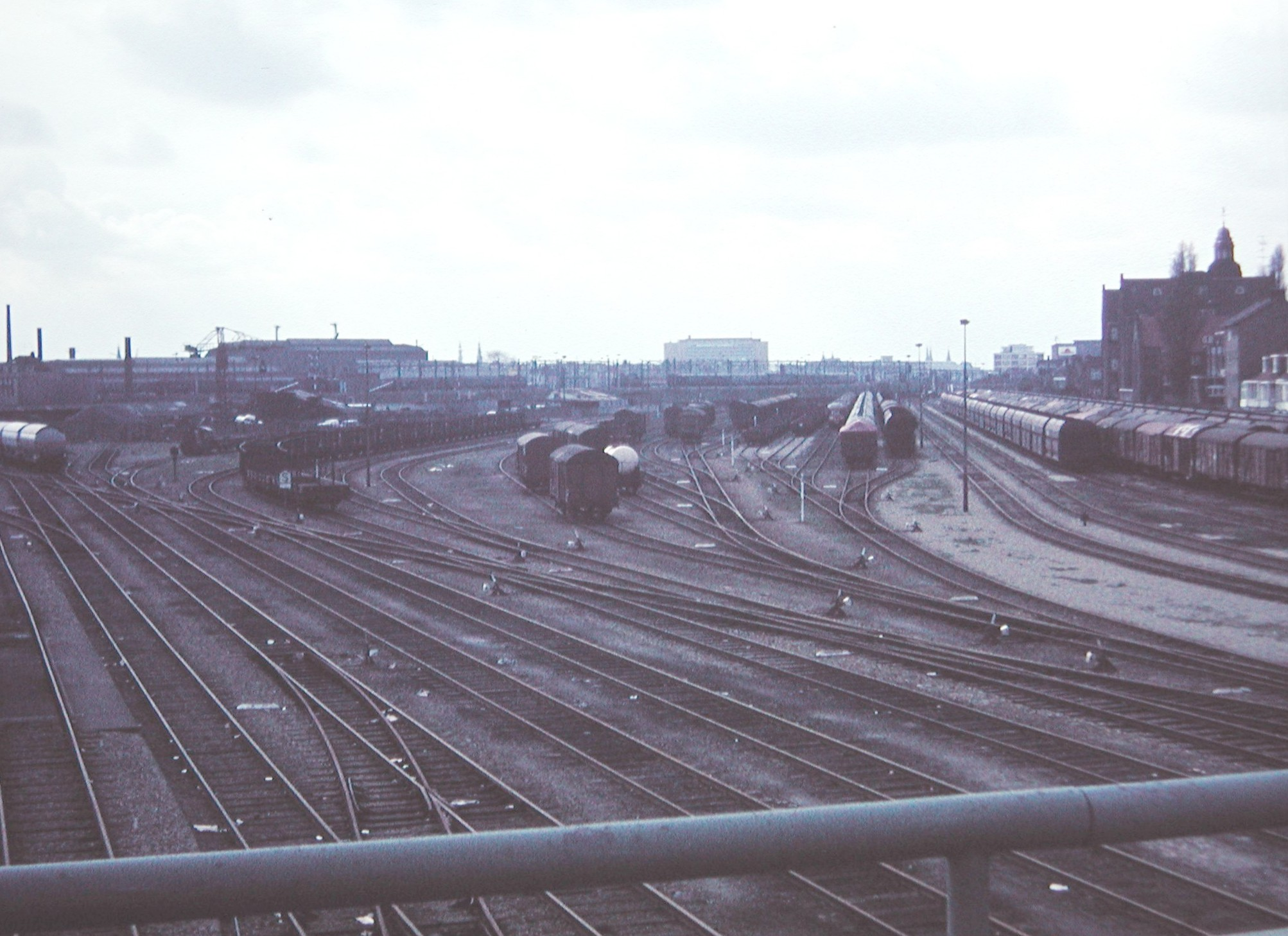 De Rietlanden, Amsterdam